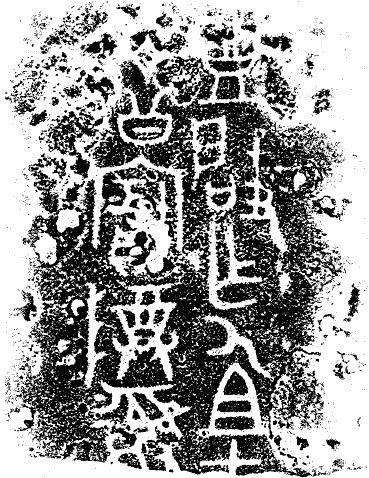 青铜器丰觥的铭文